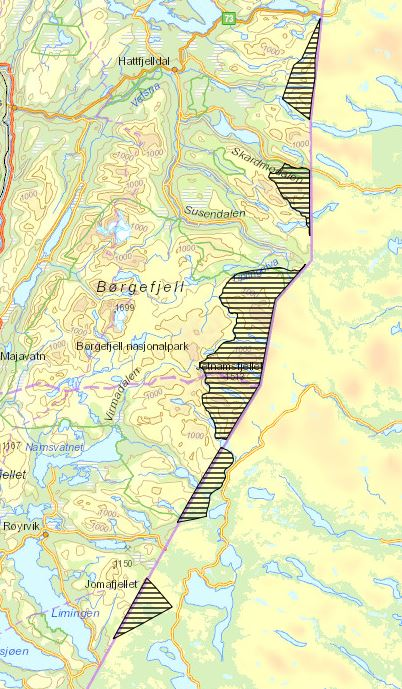 Områder i Trøndelag og Søndre Nordland hvor svenske samer har beiterein i henhold til Lappekodisillen og andre grensekonvensjoner. Også tilsvarende norsk beiterett i Sverige.